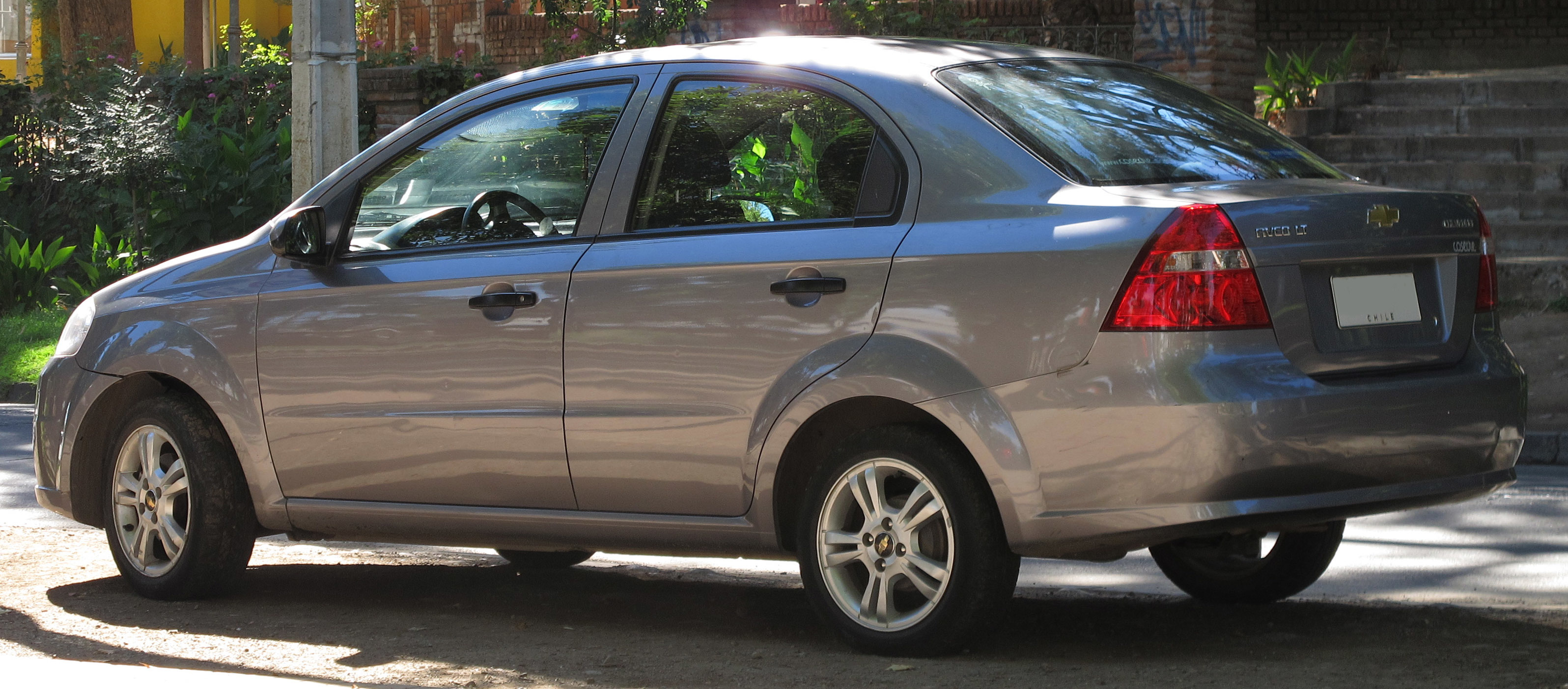 Chevrolet Aveo 1.4 LT Sedan 2011